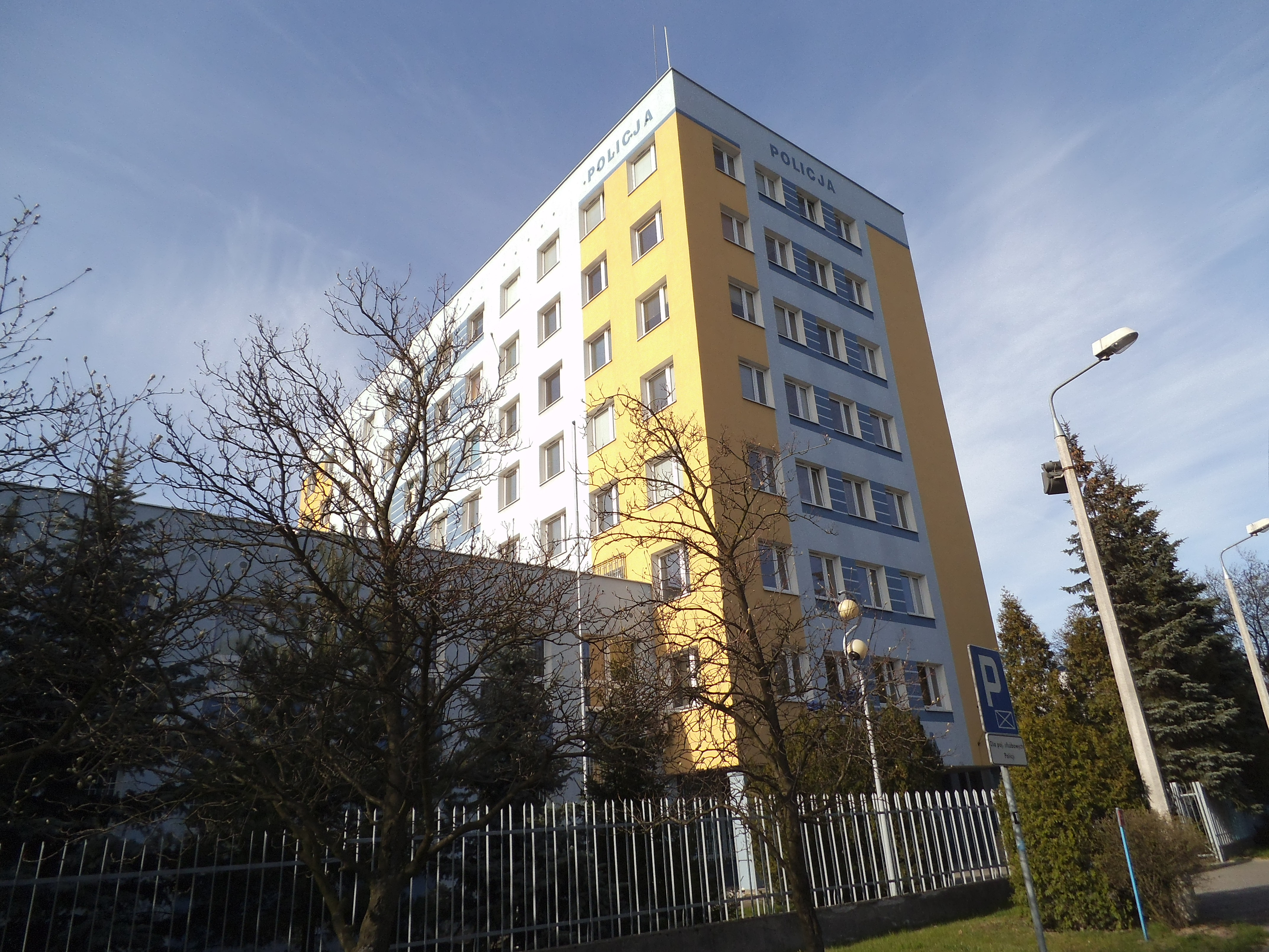 Policja w Toruniu